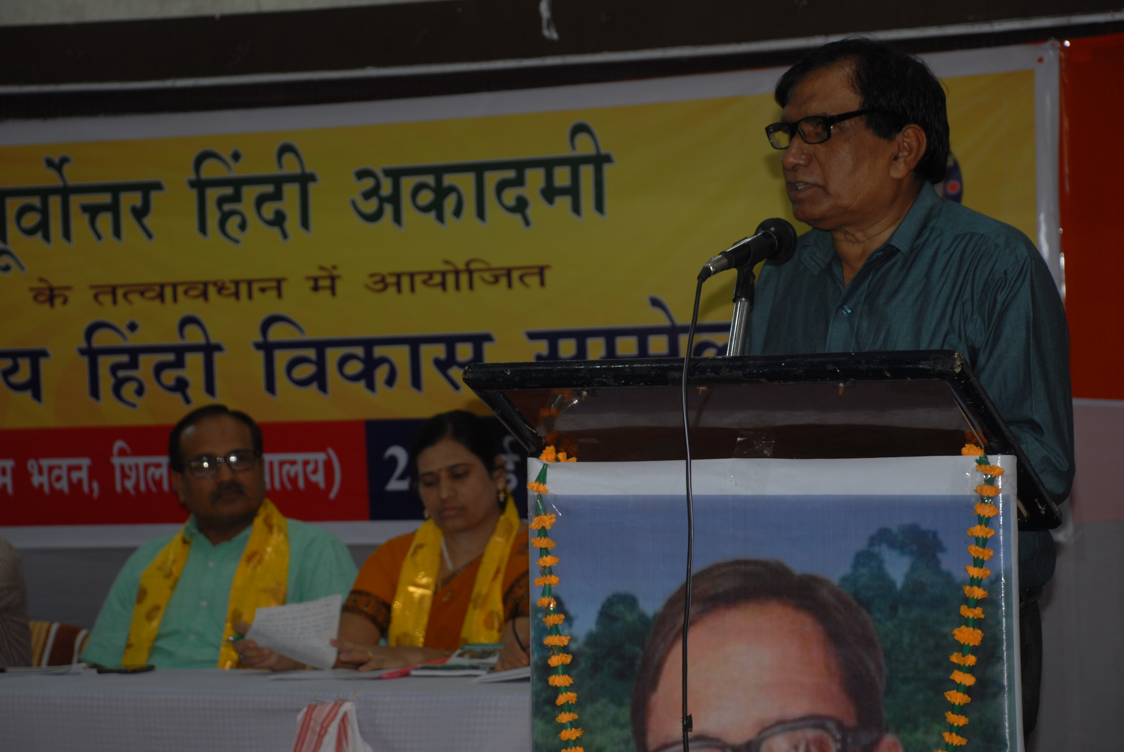 यह सम्मेलन प्रति वर्ष मई माह के चौथे शुक्रवार से आरंभ होता है।